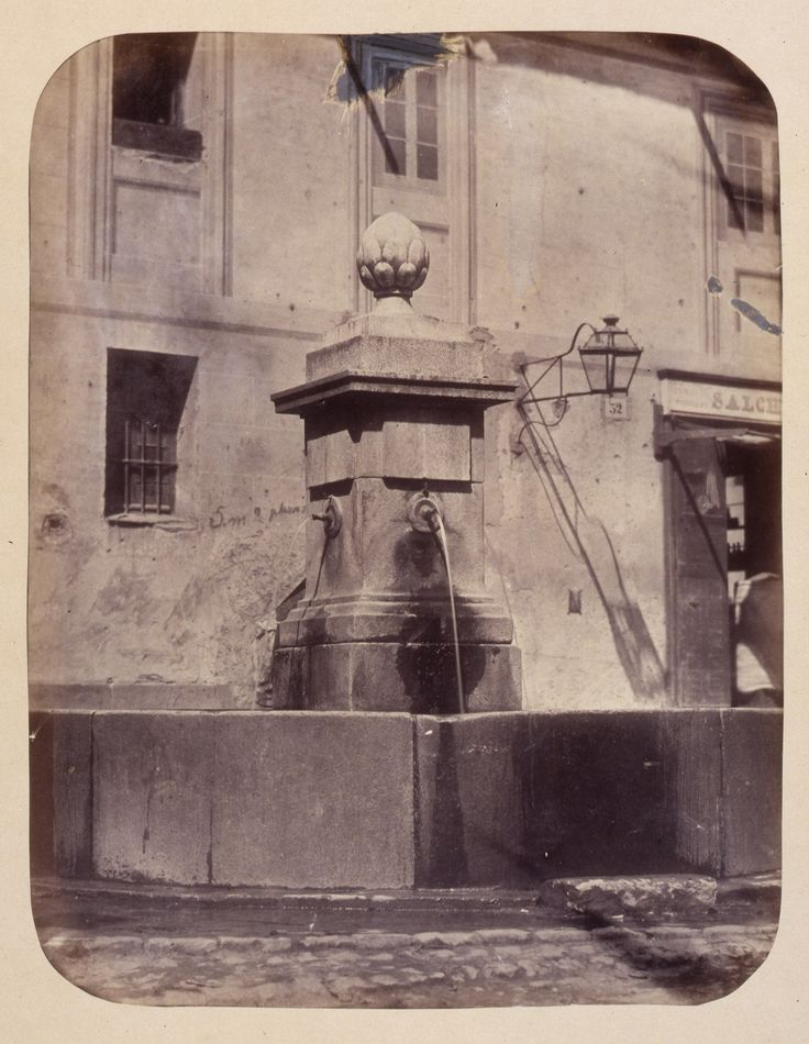 'Fuente de la plazuela de la calle de Cabestreros (Madrid). Obra en 1864 del fotógrafo toledano Alfonso Begué, muerto el 31 de octubre de 1865. Cartulina sepia. Albúmina. 43 x 32 cm. Fotografía contenida en un álbum procedente del Archivo de Villa y trasladado al Museo de Historia en 1983.